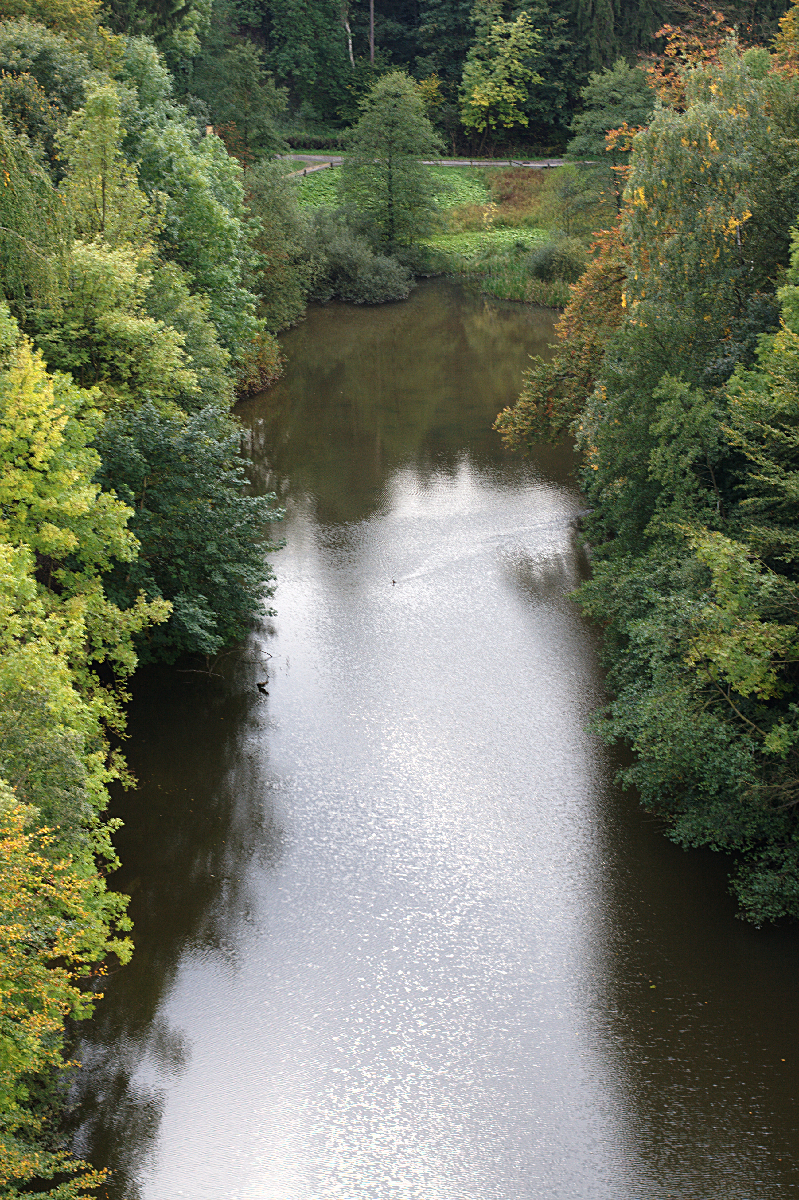 Externsteine, Blick von den Felsen auf den Wiembecke-Teich, bachaufwärts